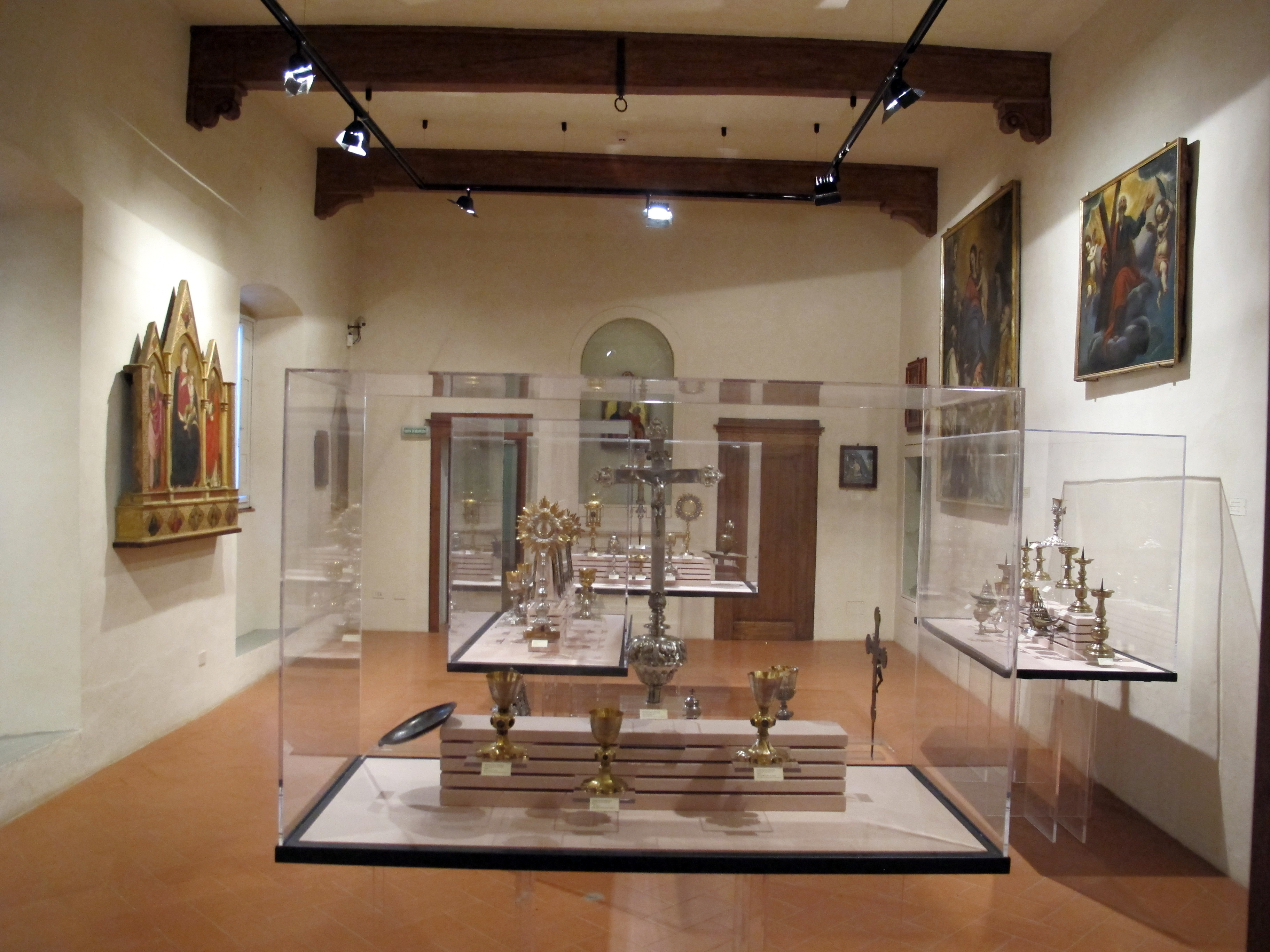 Museo di arte sacra (Montespertoli)